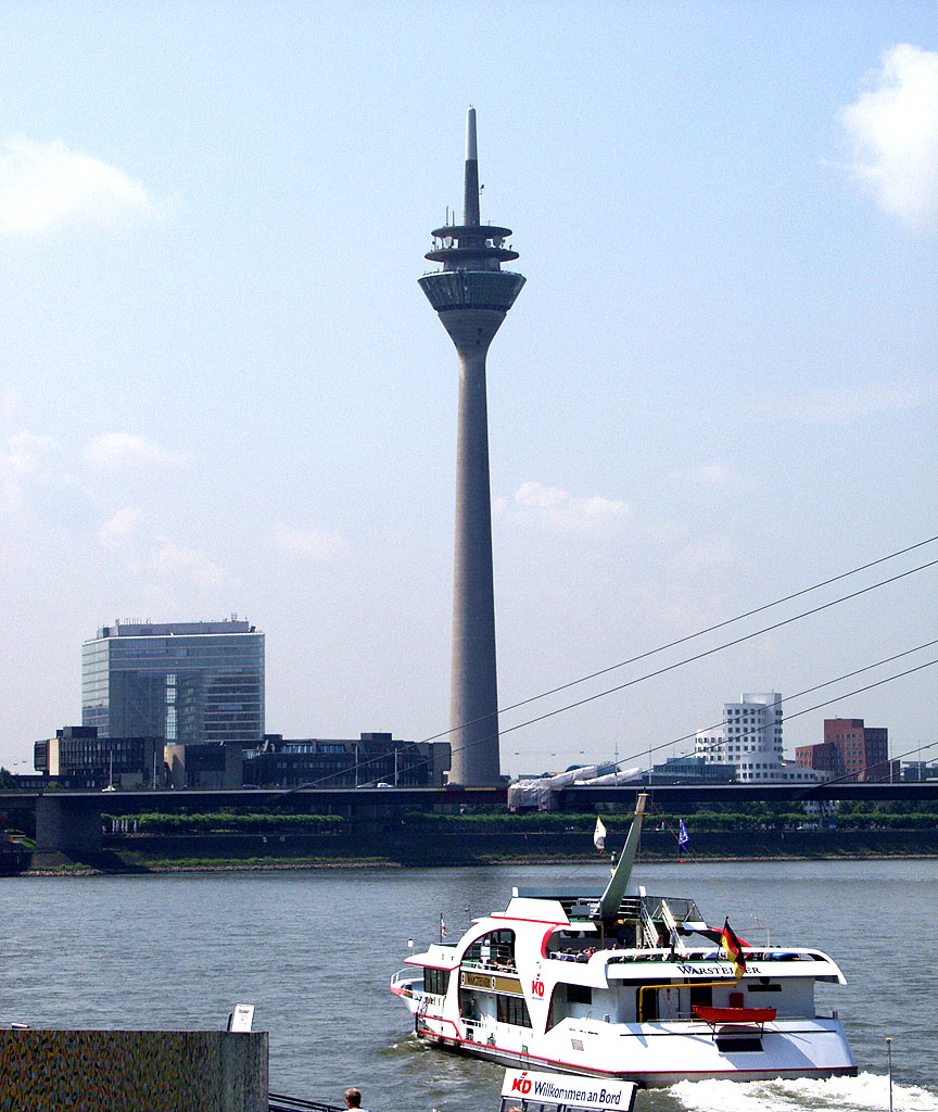 Rheinturm in Düsseldorf. Im Vordergrund die MS Warsteiner Düsseldorf